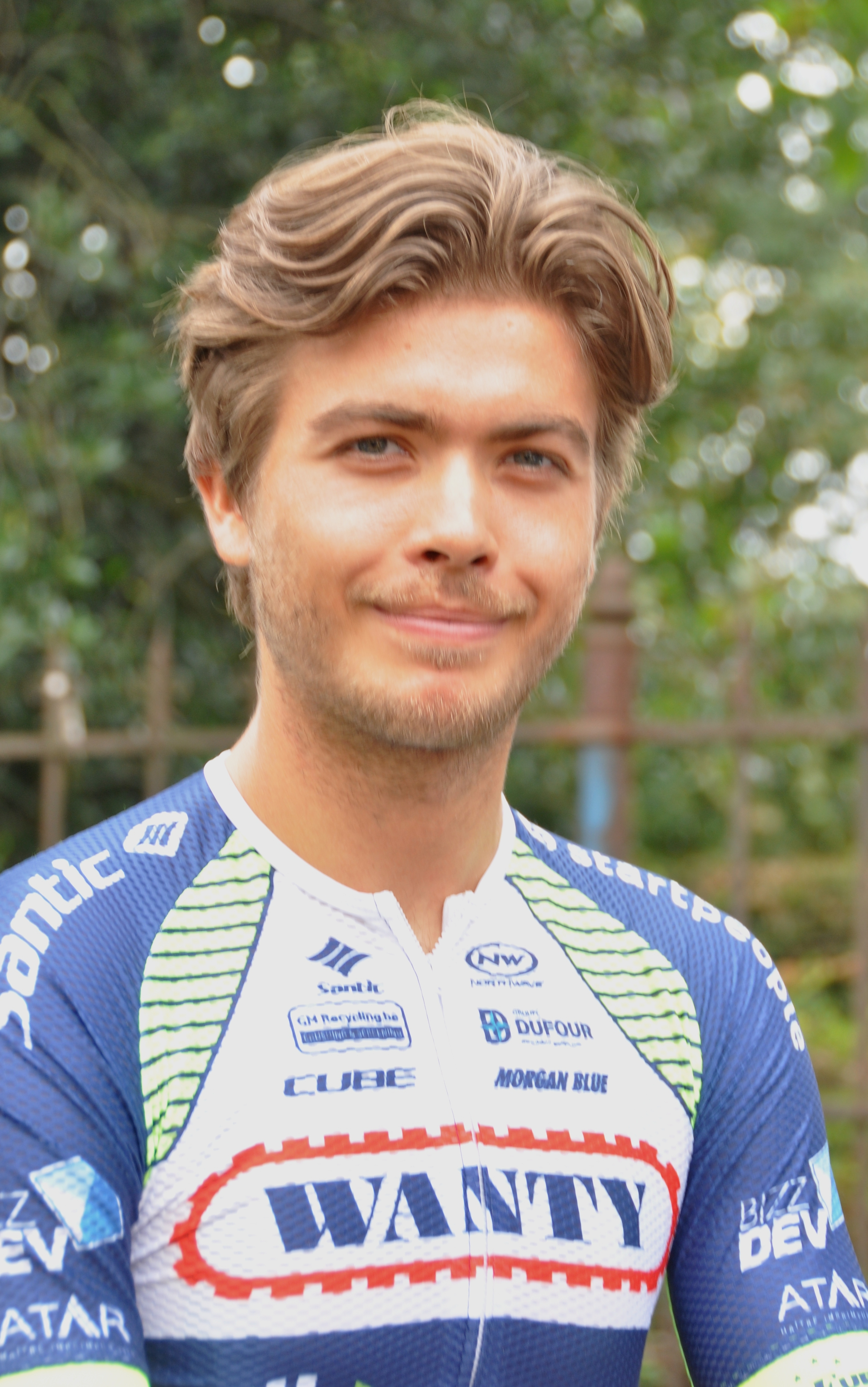 Odd Christian Eiking, norwegischer Radrennfahrer